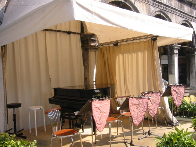 Terrasse orchestre du Café Florian - Venise